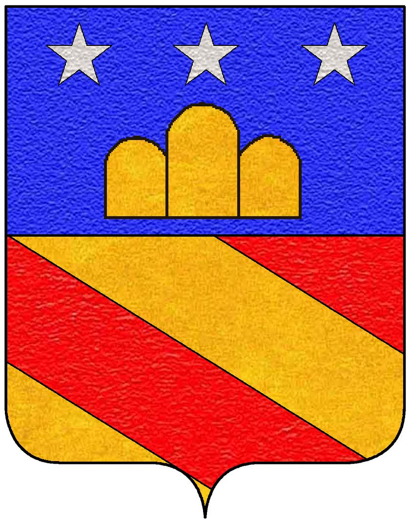 Stemma della famiglia Adami